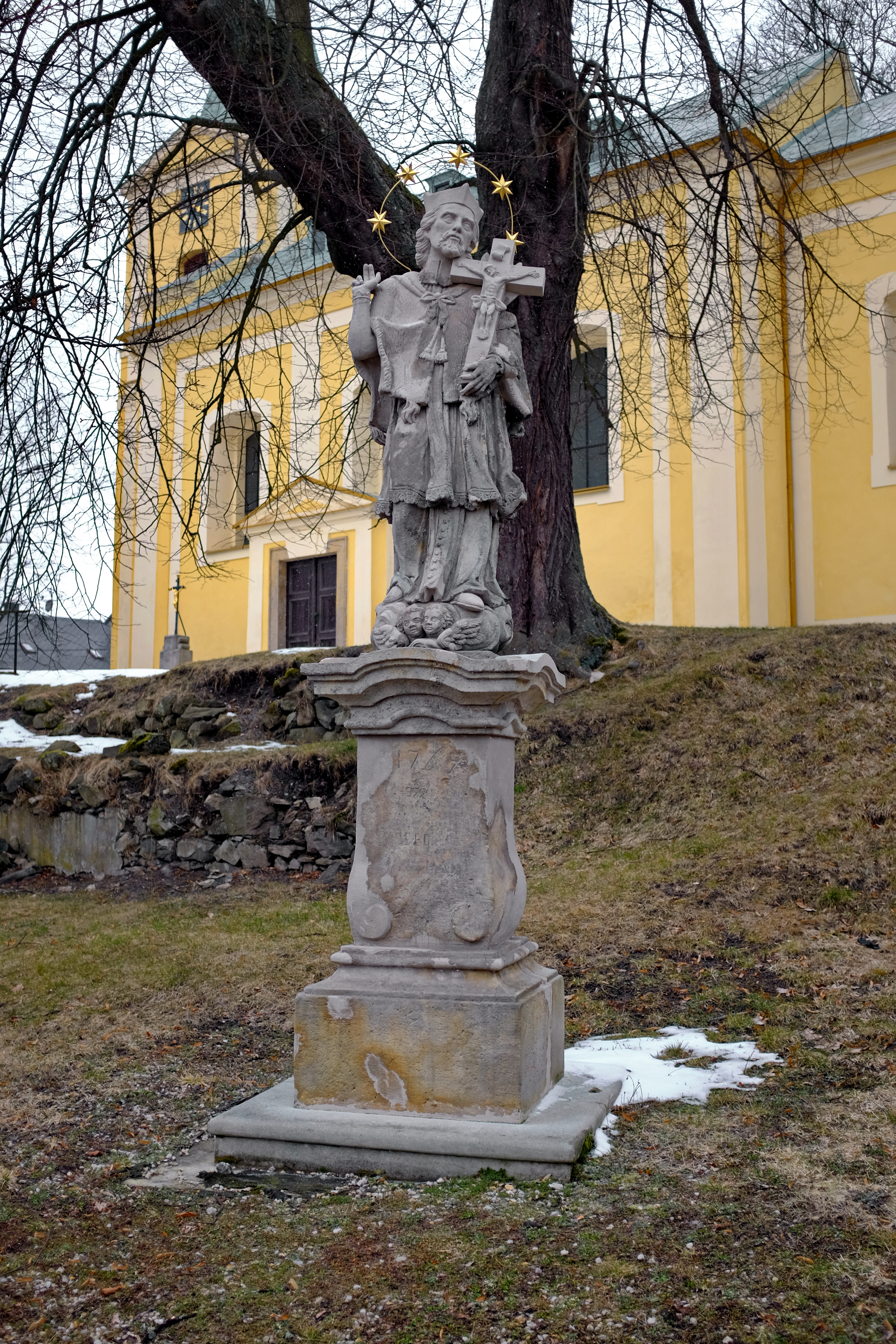 Andělská Hora, socha sv. Jana Nepomuckého, okres Karlovy Vary